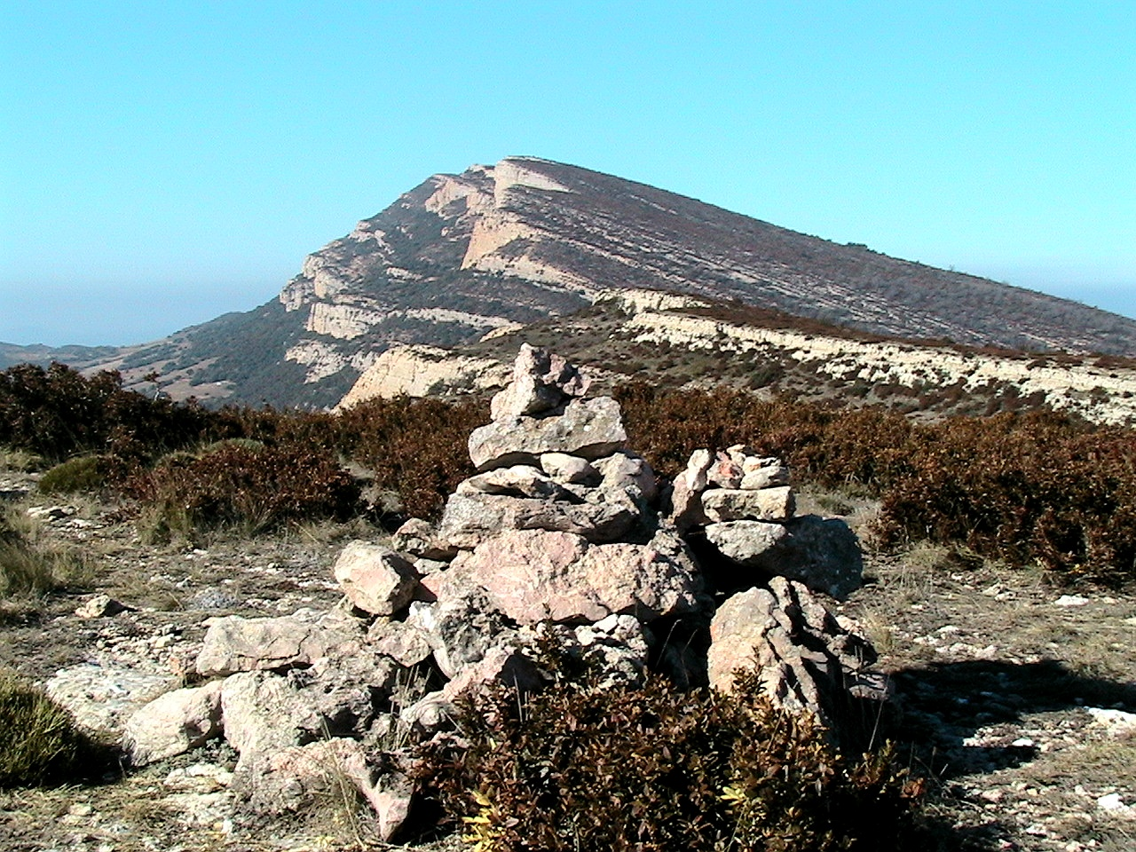 El Puig del Camí Ramader des de la Roca Alta.